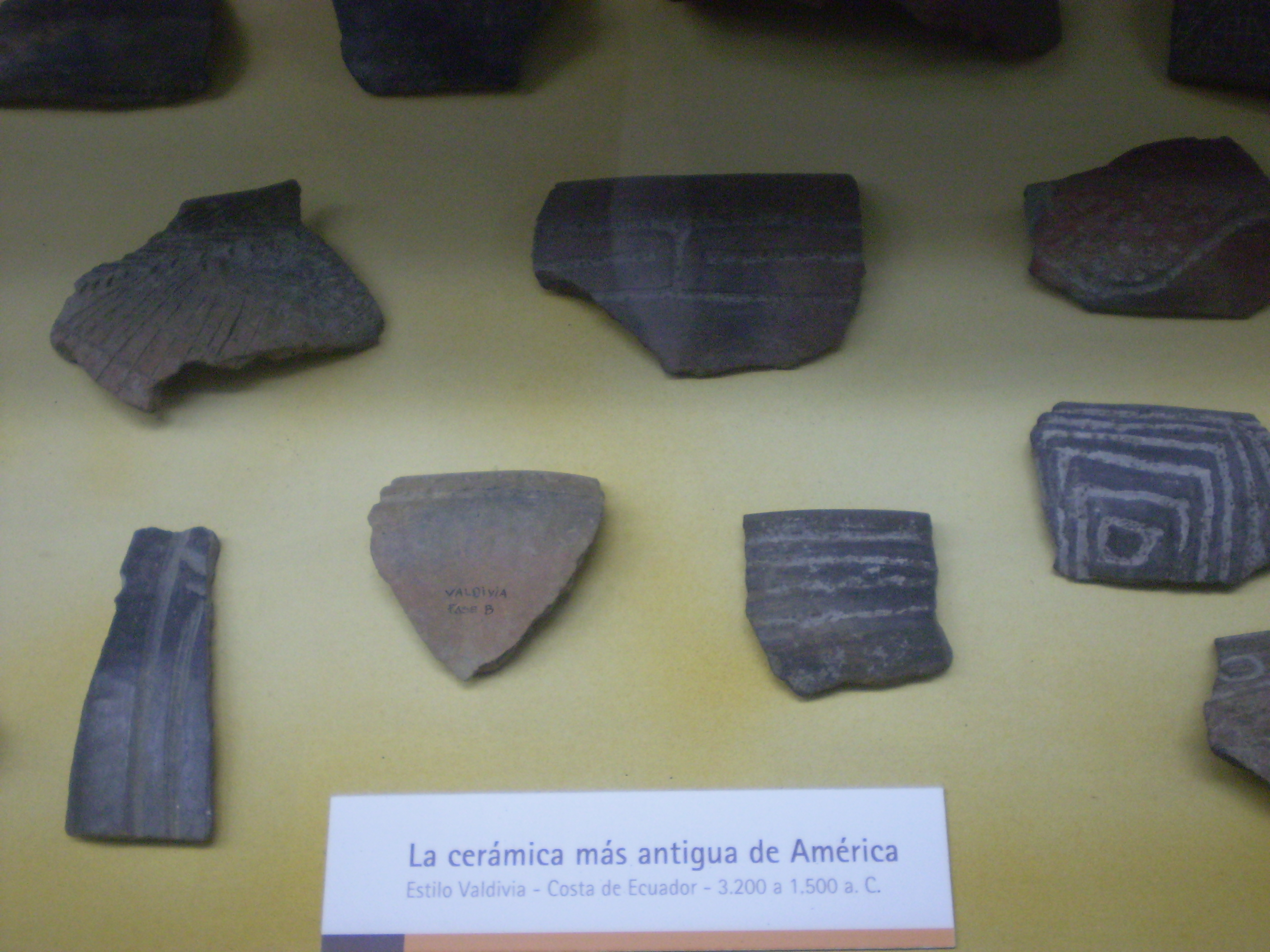 Trozos de la cerámica más antiguos de américa (3200 a 1500 a.c.).Estilo Valdivia, costa del Ecuador. Sala de etnografía dedicada a las culturas que se desarrollaron fuera del actual territorio de la Argentina. Museo de La Plata